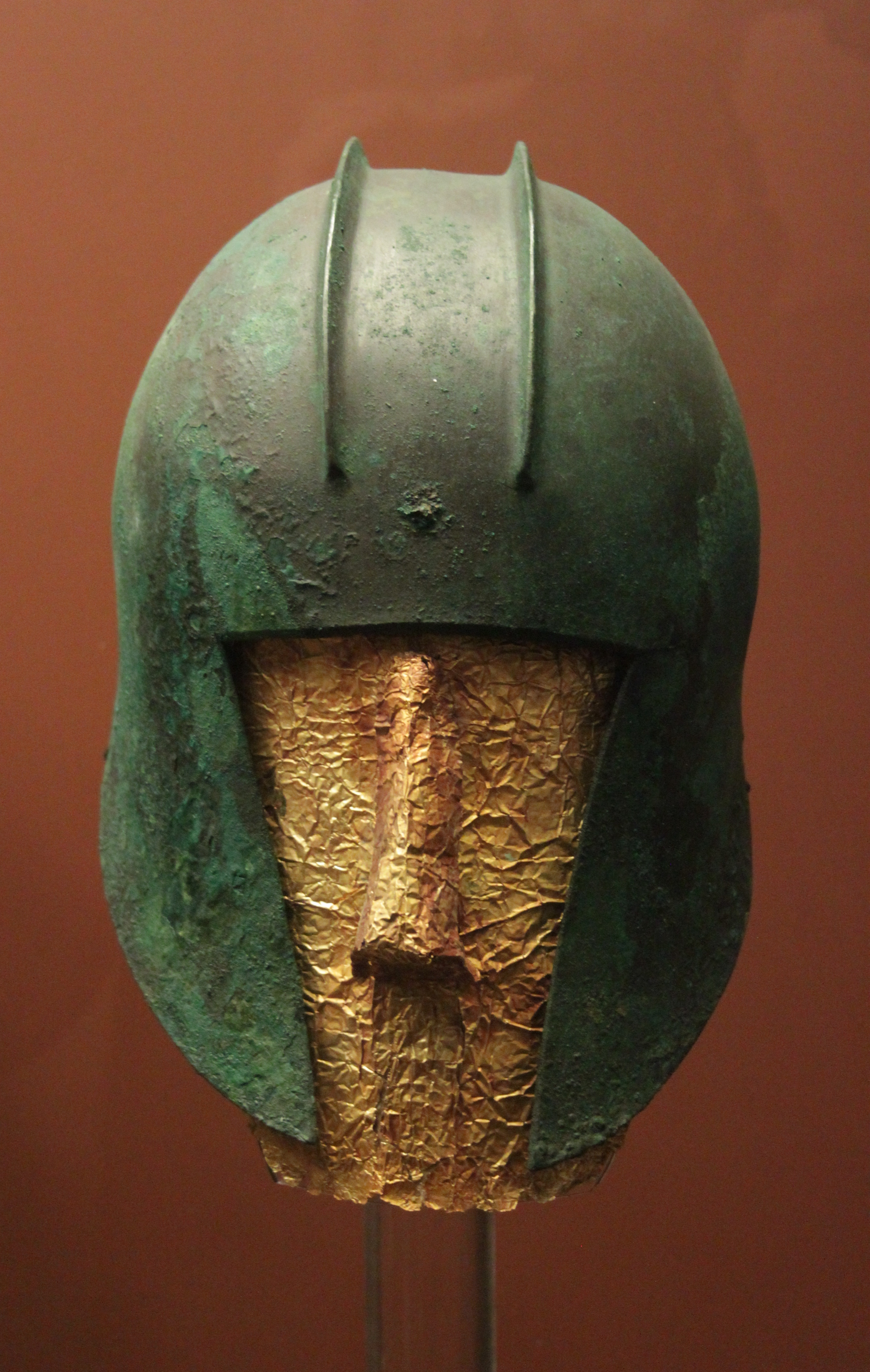 Elmo in bronzo, tipo illirico proveniente dal sito di Calcide e risalente ai primi del VI secolo a.C., conservato al Museo archeologico nazionale di Atene